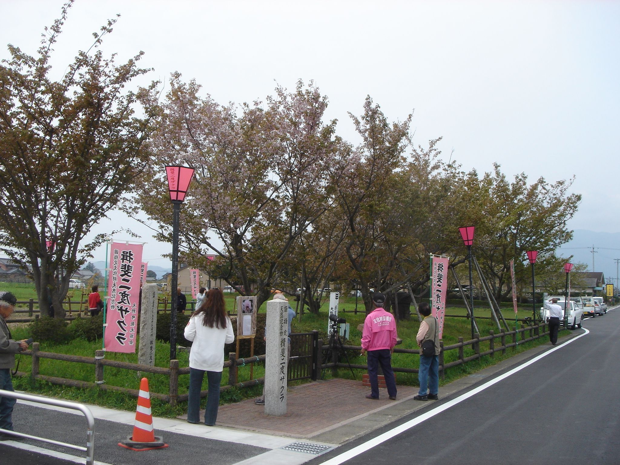 (揖斐二度桜),Ono,Gifu,Japan(岐阜県大野町)で撮影。